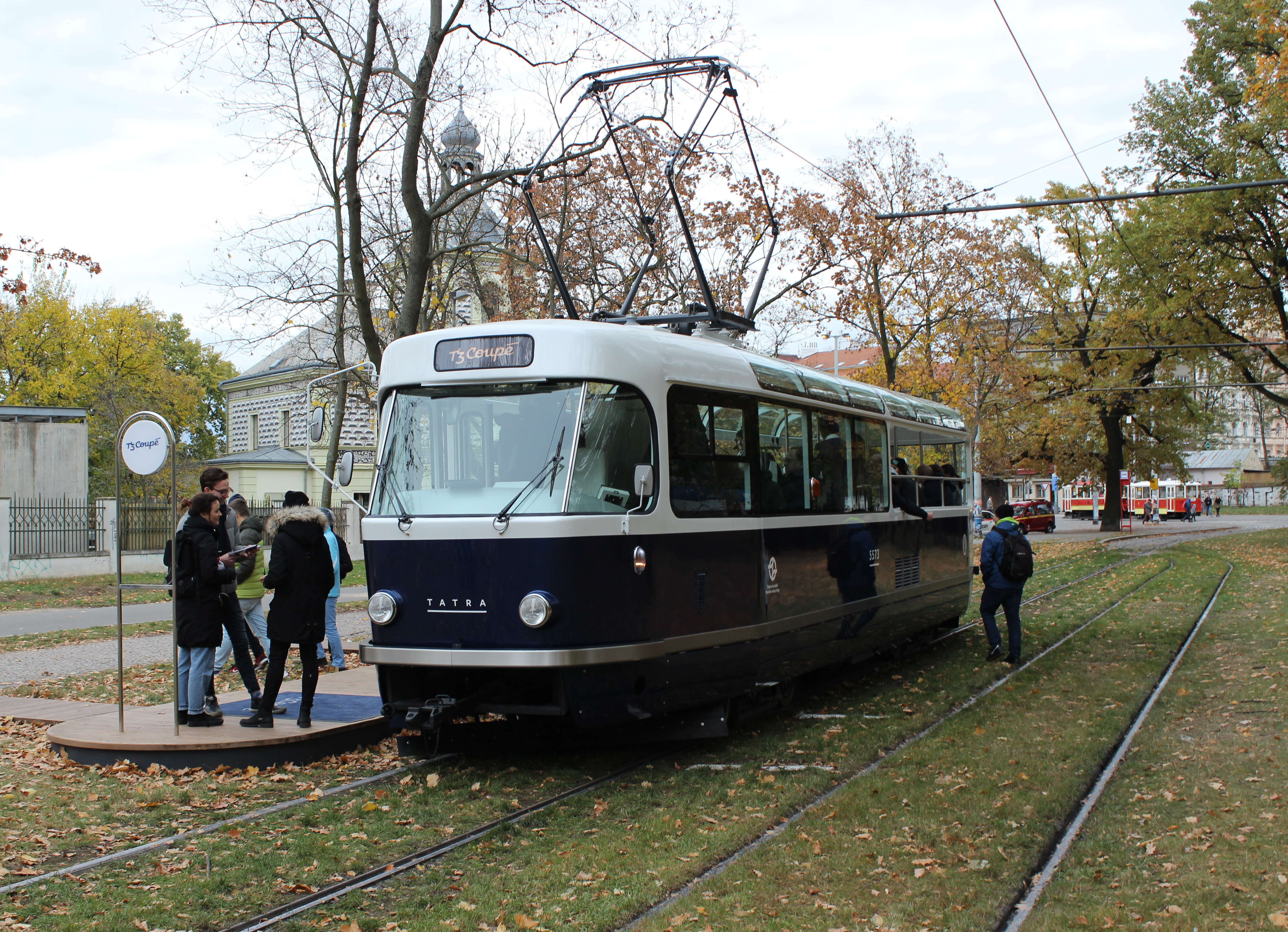 Pohled na tramvajový vůz T3 Coupé čekající ve smyčce u pražského Výstaviště Holešovice.